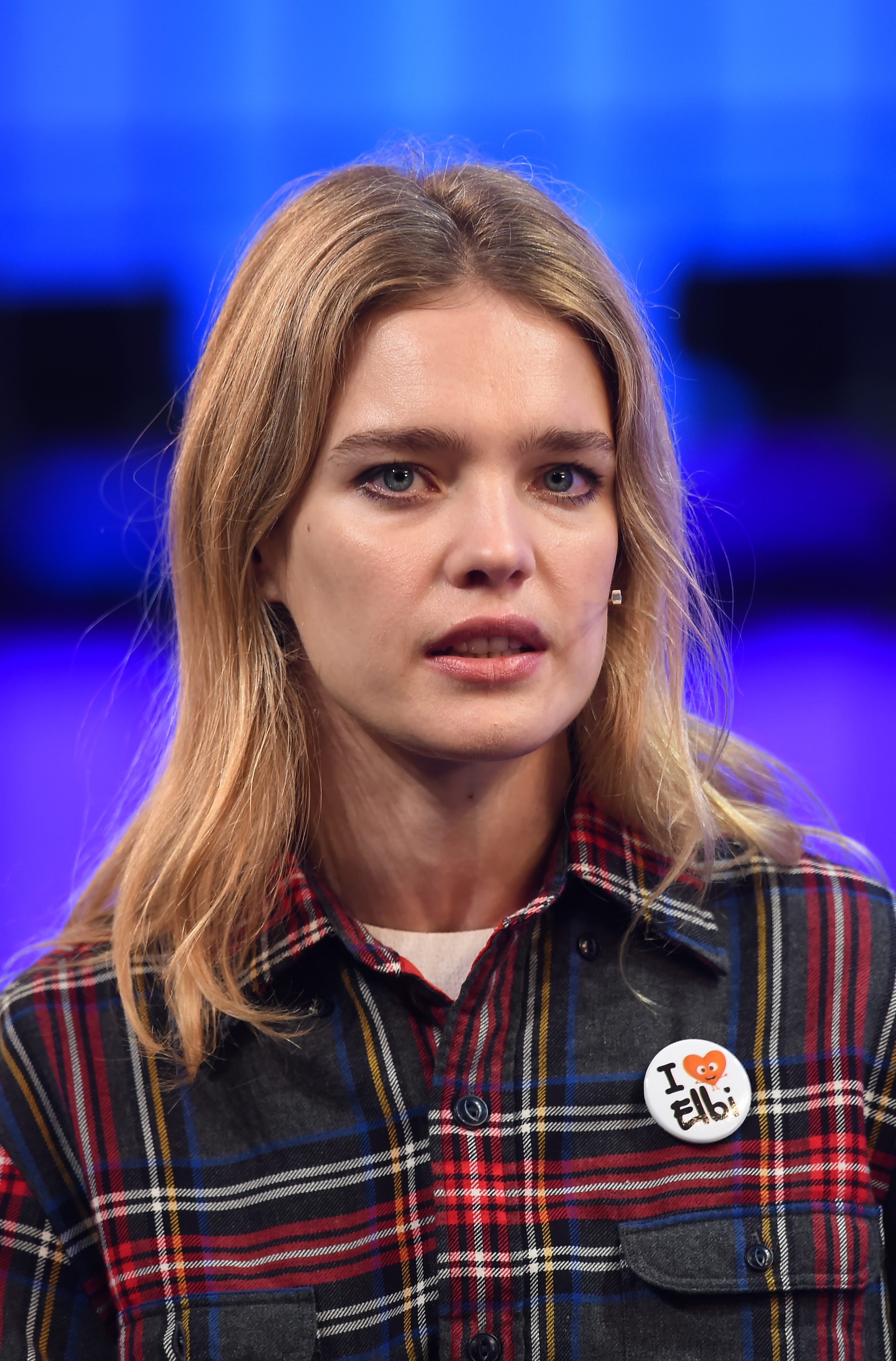 Sportsfile (Web Summit)